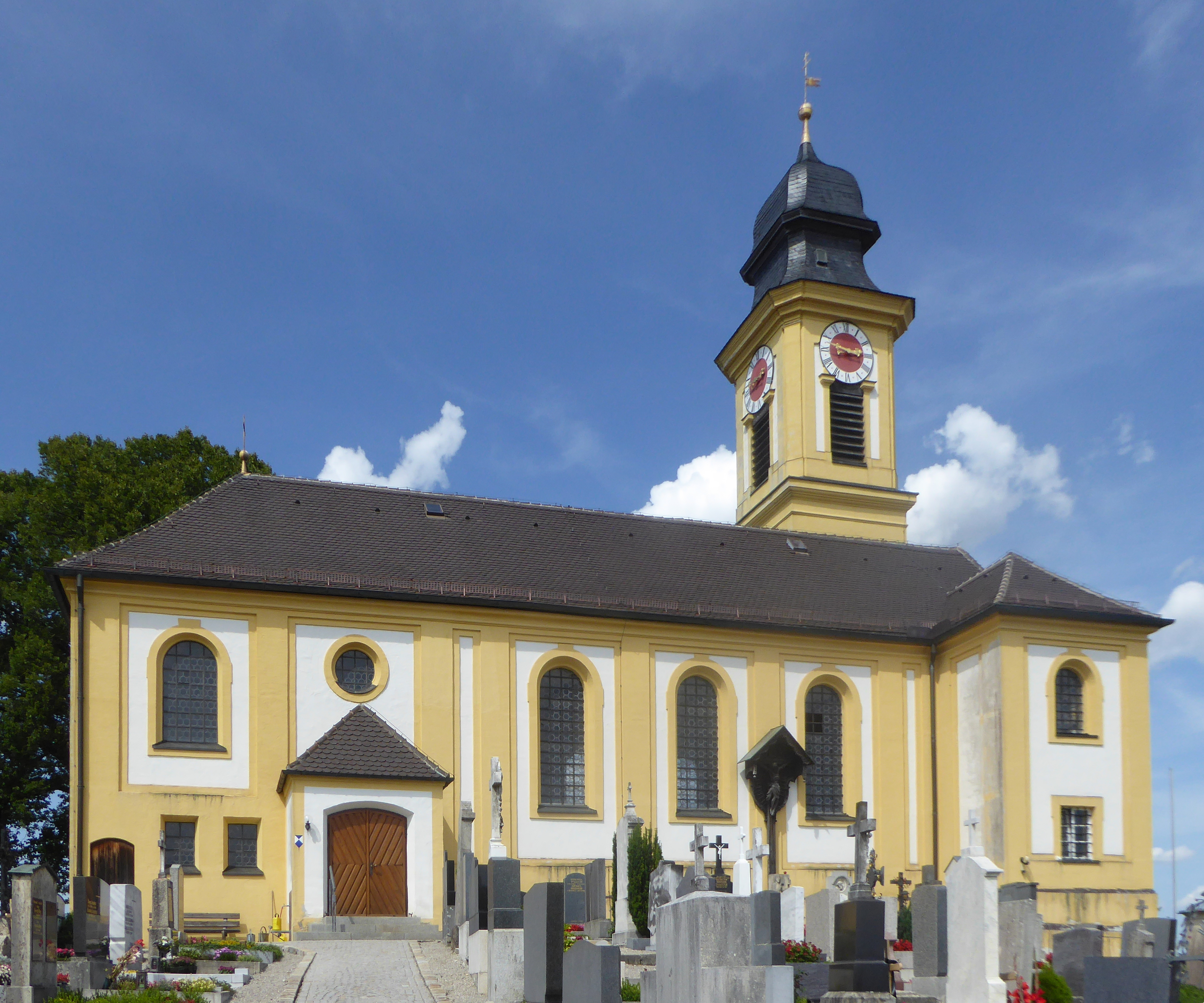 Hohenschäftlarn, Georgskirche von Süden gesehen.